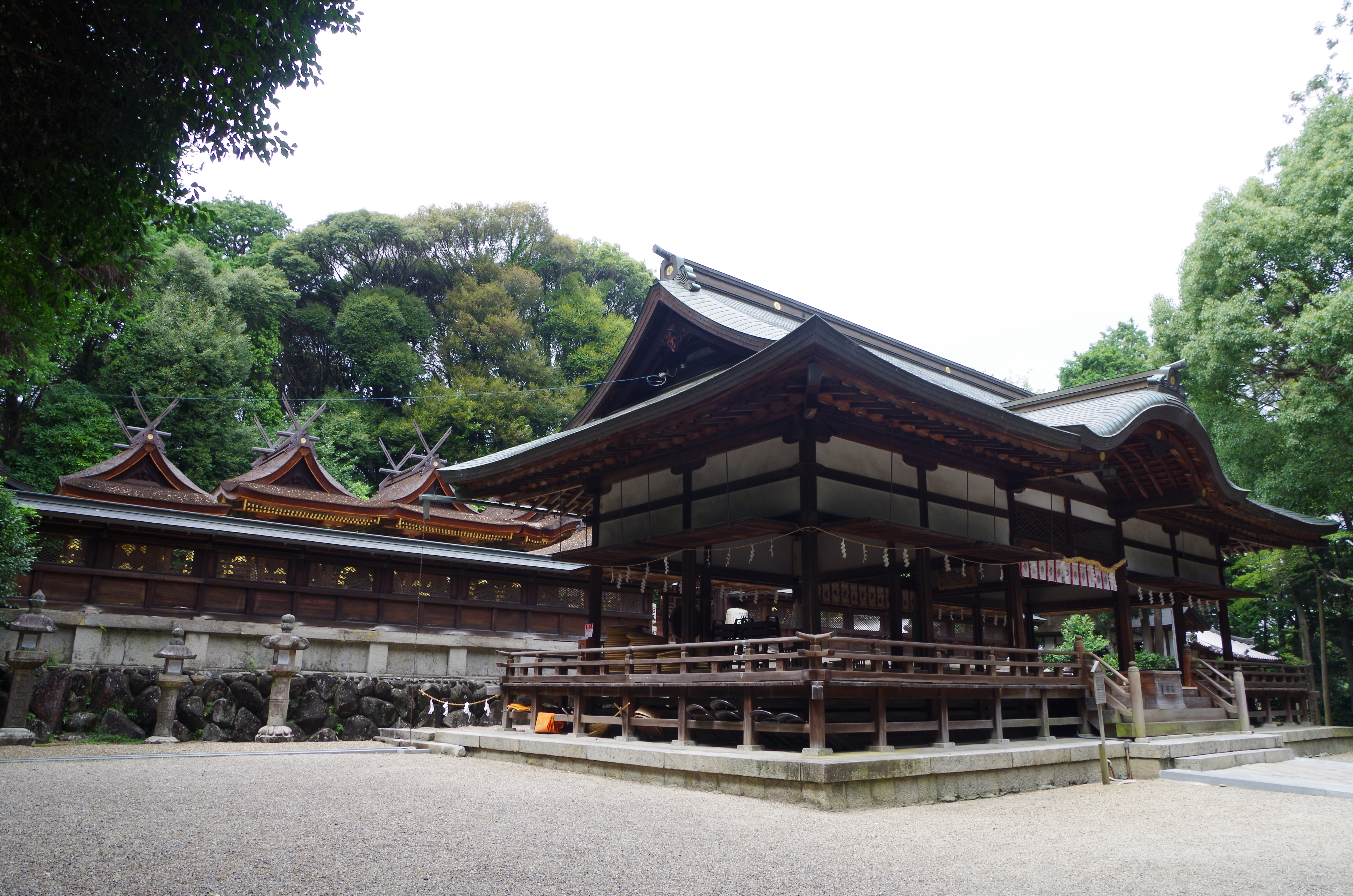 往馬坐伊古麻都比古神社(往馬大社) 生駒市壱分町 Ikoma-ni-imasu-ikomatsuhiko-jinja (Ikoma-taisha) 2013.8.28